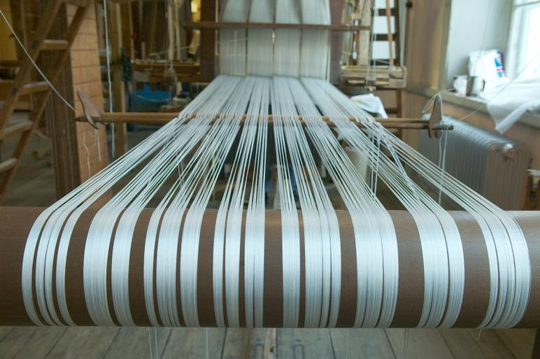 Varpen i vävstolen. Motiv: Almgrens sidenväveri Kategori: Väveri, Museum Varpen i vävstolen.